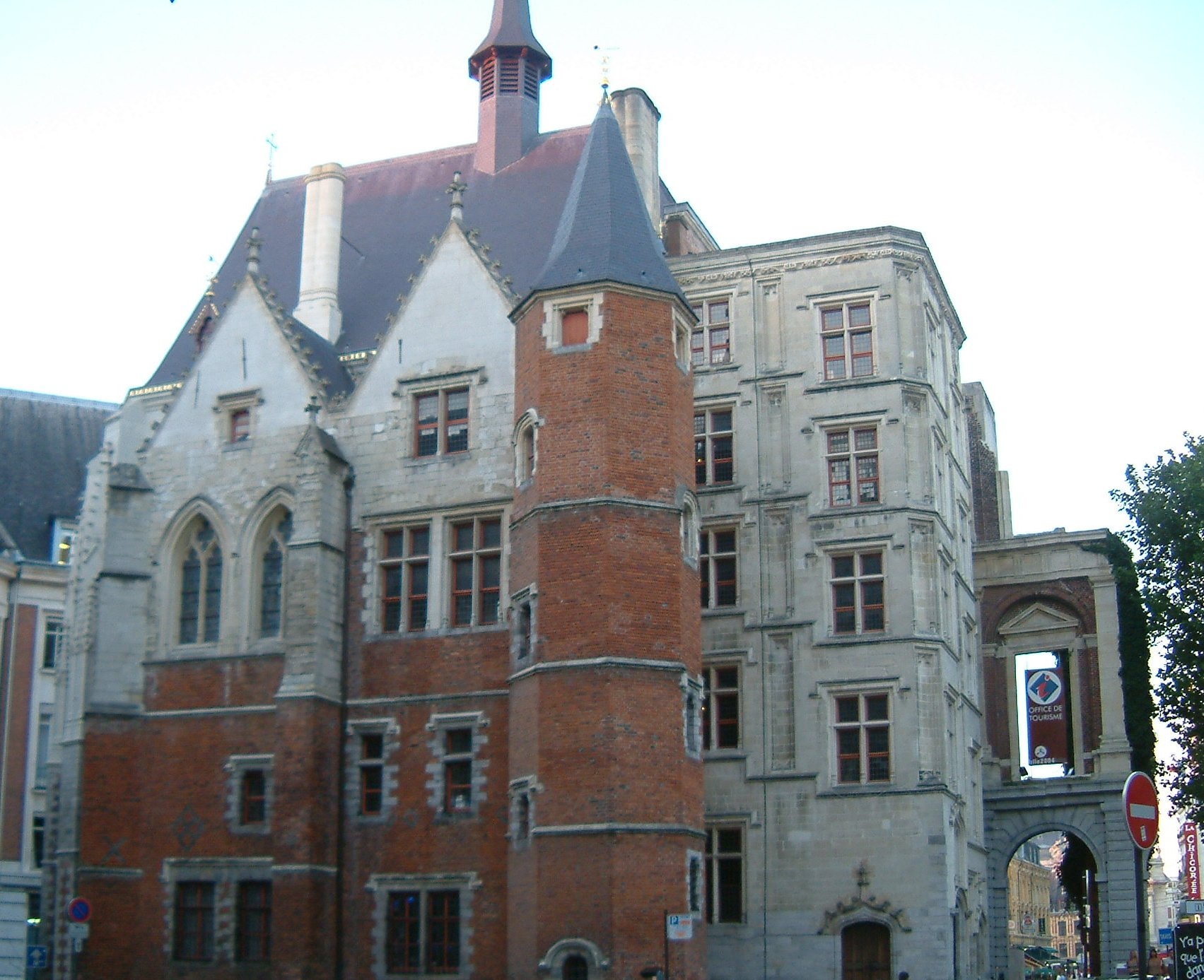 Palais Rihour, Lille, FRANCE